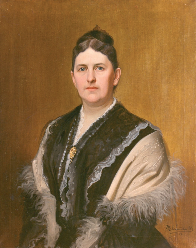 Michael Emonds-Alt: Portrait vun der Thérèse Glaesener-Hartmann.